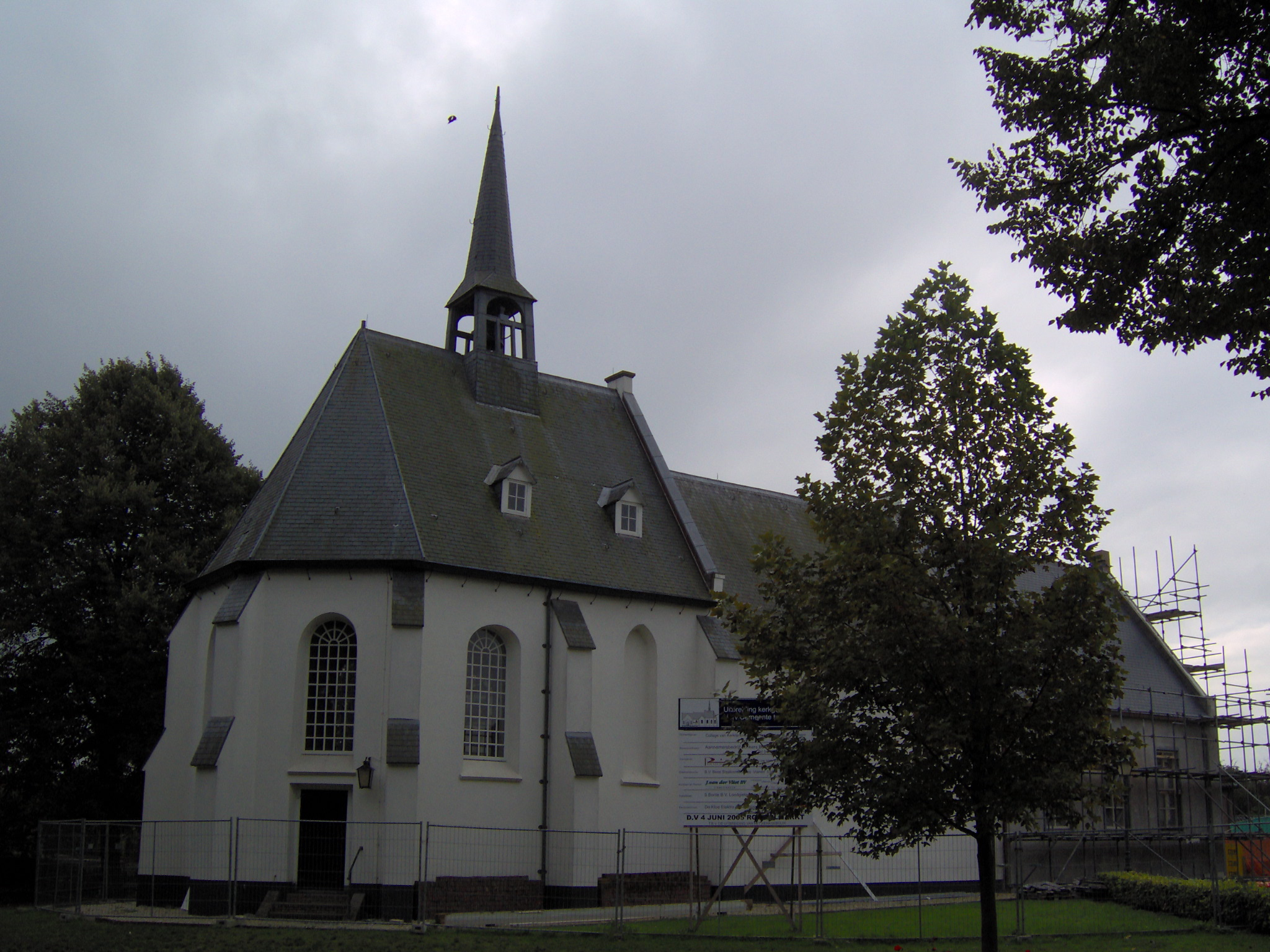 eigen foto